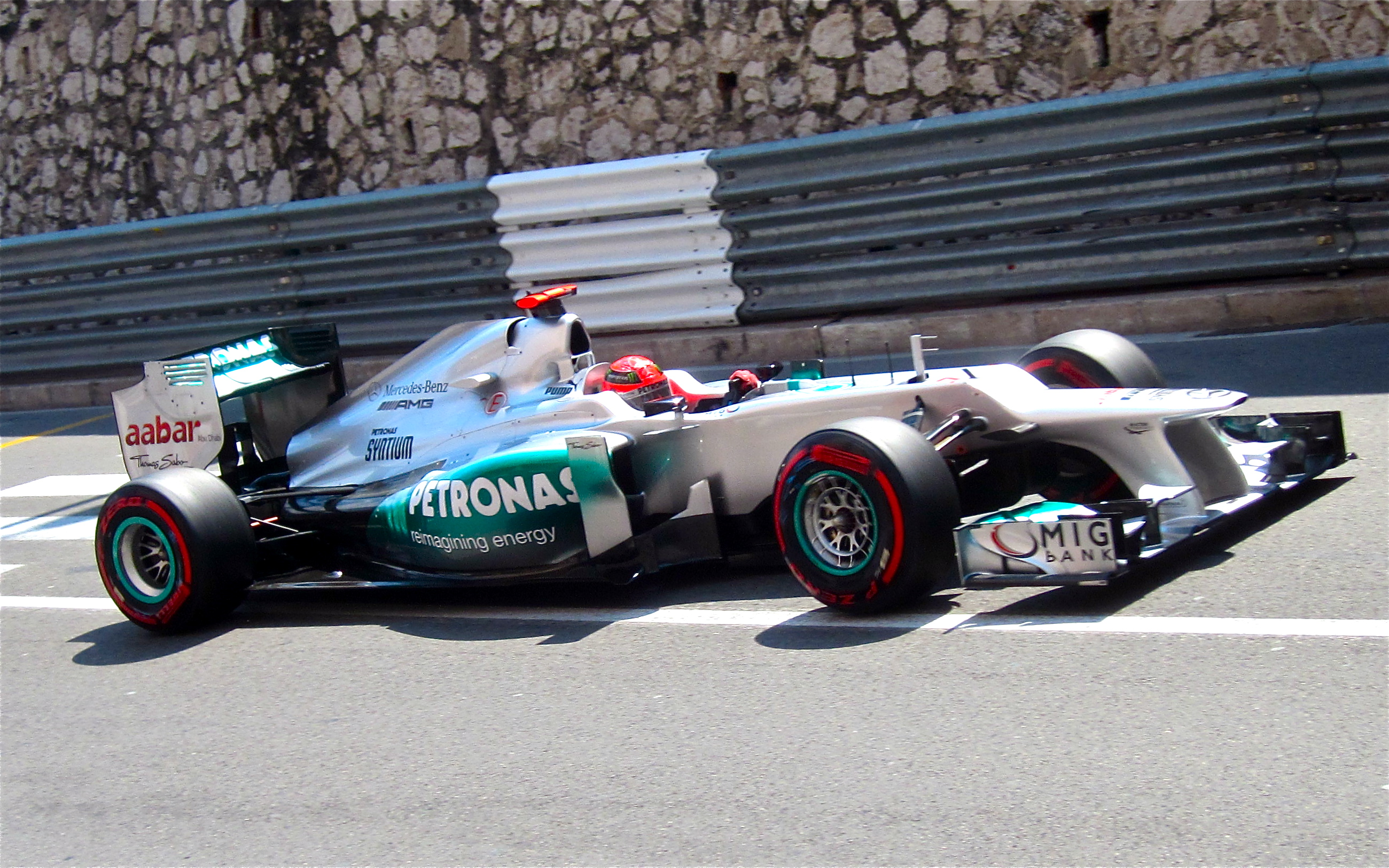 Michael Schumacher in his POLE lap at Monaco May 26,2012